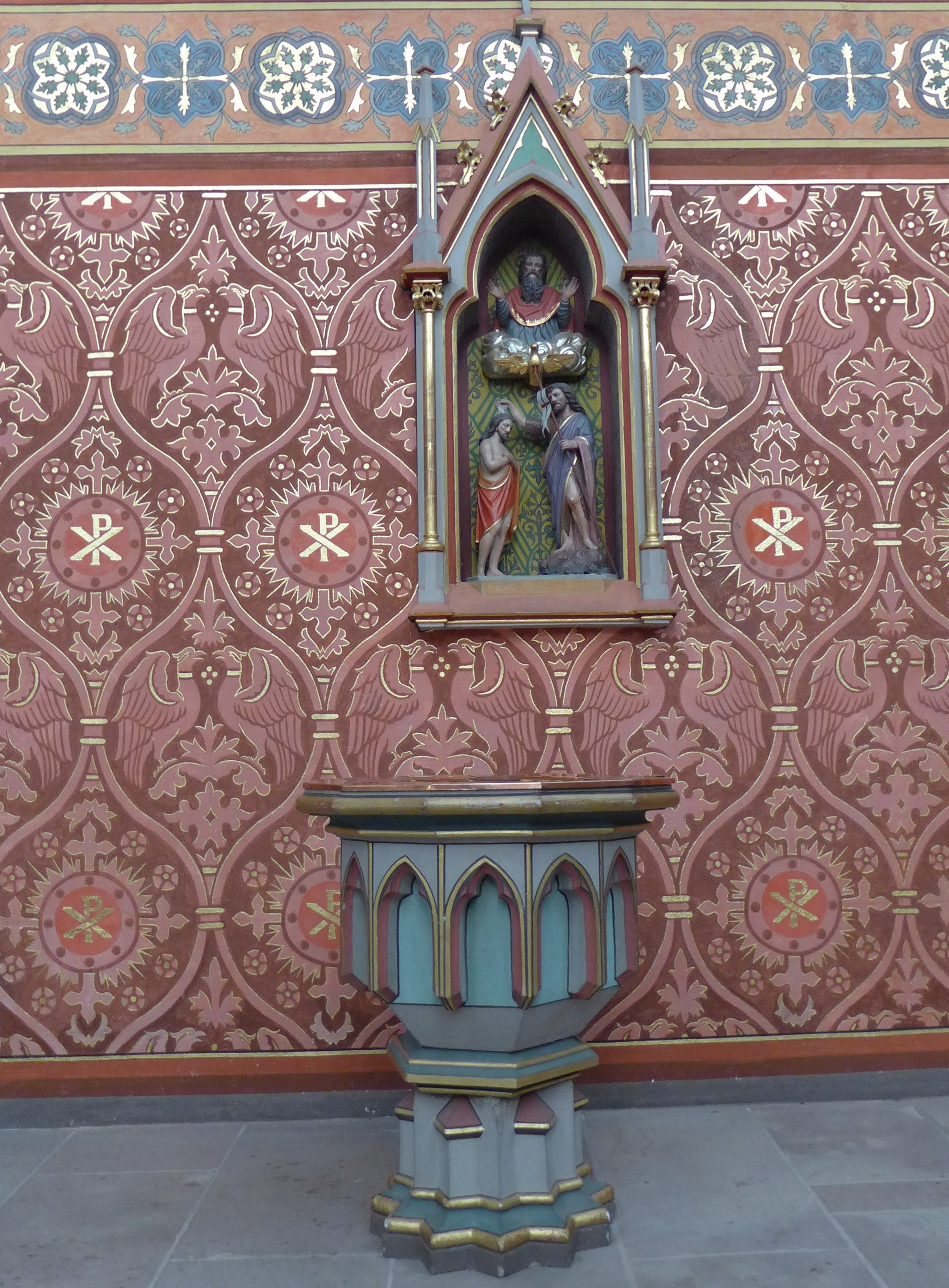 St. Katharina (Wallerfangen), Taufbecken